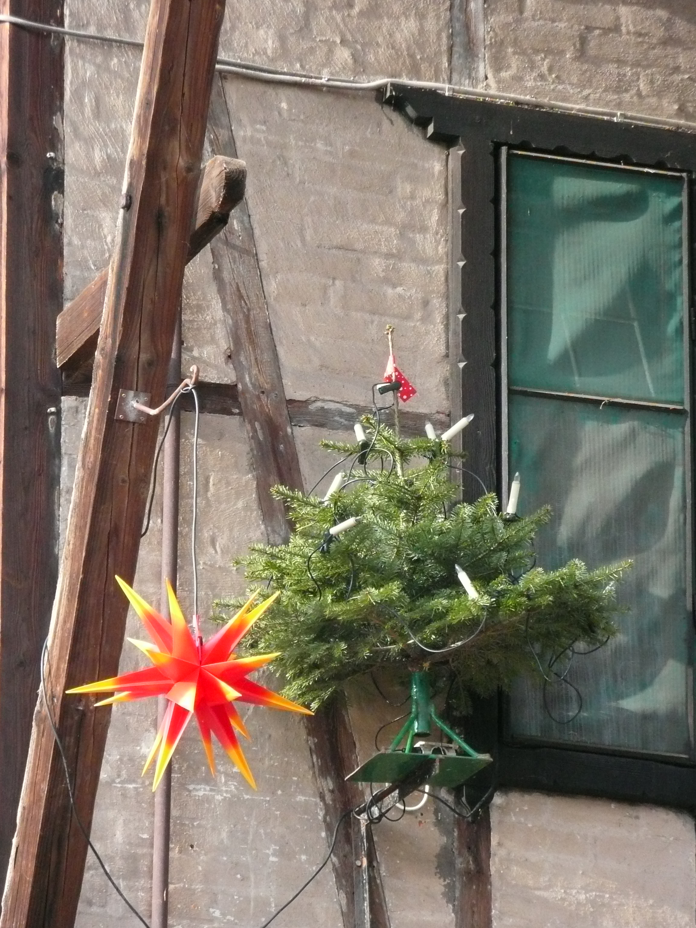 Weihnachtsstern und Weihnachtsbaum mit Beleuchtung, fotografiert auf dem Stift Neuburg (Baden-Württemberg, Deutschland)